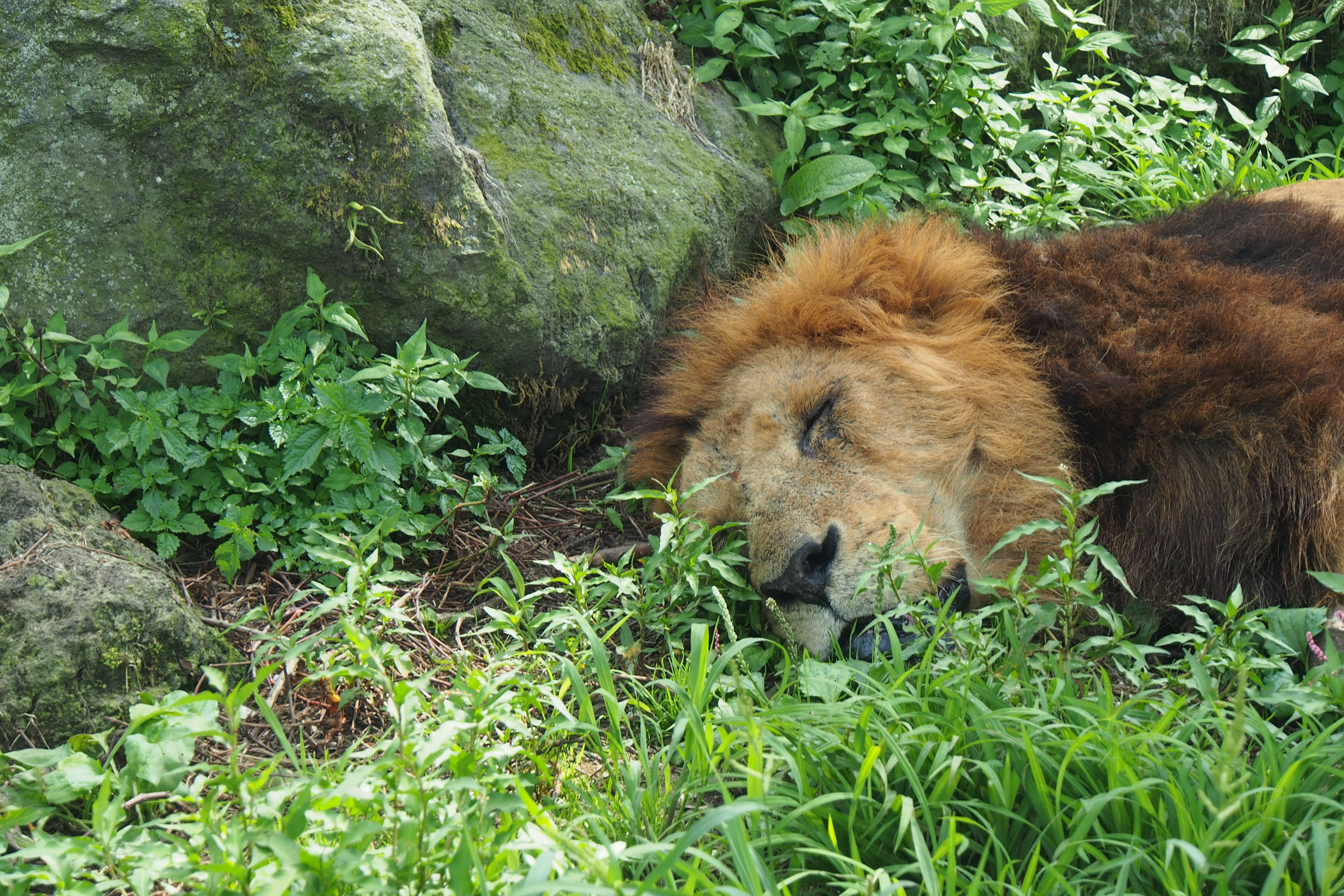 ライオンの寝顔。富士サファリパークにて。2013年2月以前。